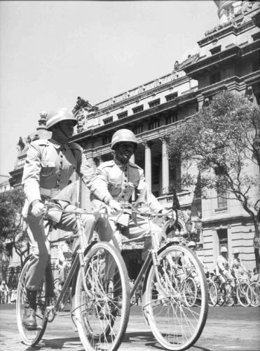 Policiamento ciclístico feito pela PMERJ na década de 1950.